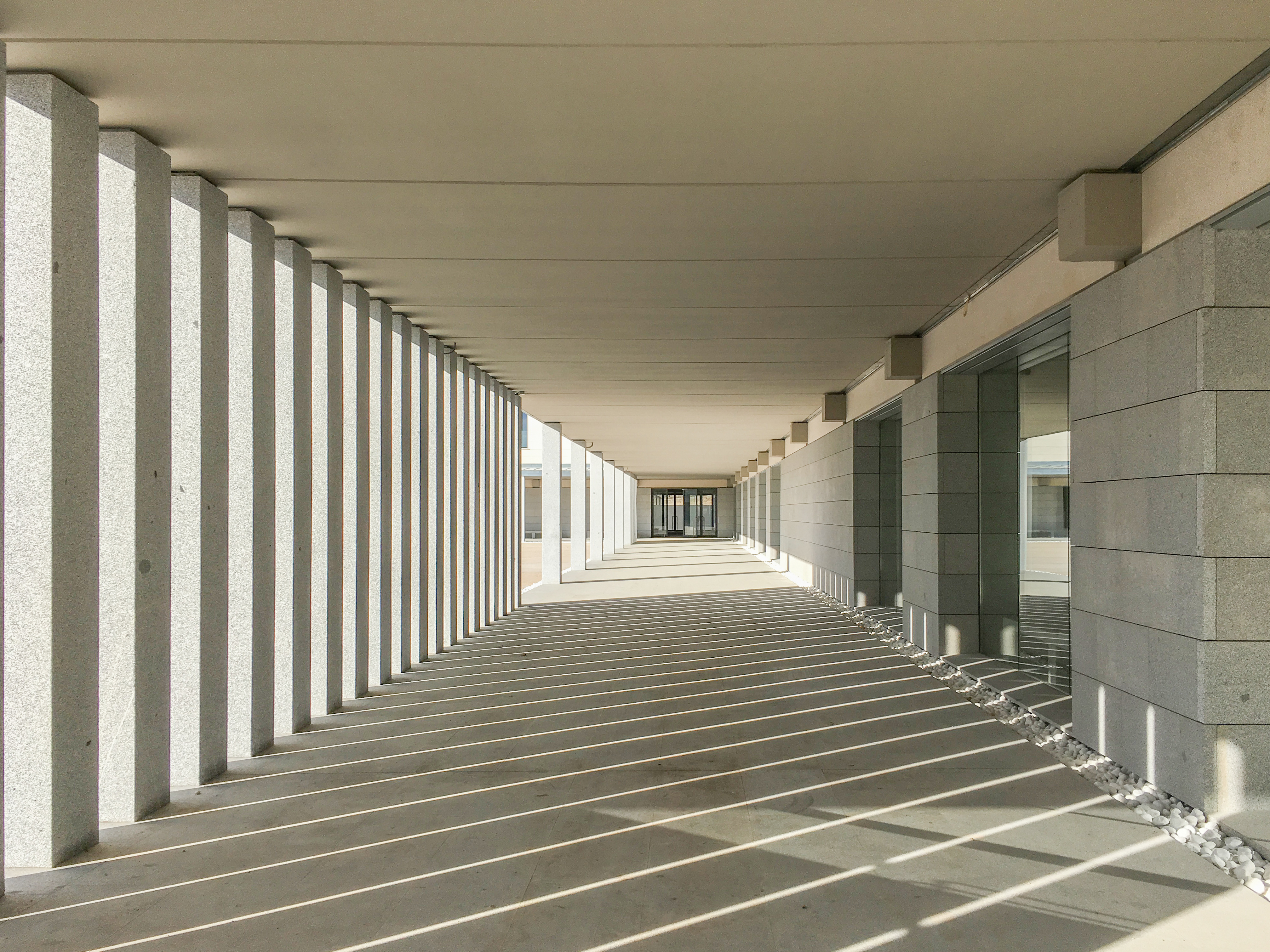 Nueva Academia de Oficiales de la Guardia Civil en Aranjuez. Fotógrafo: Pablo Bayón